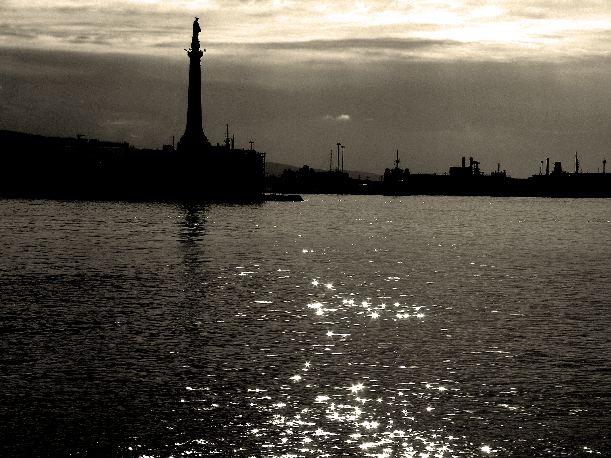 La madonnina del porto di Messina.